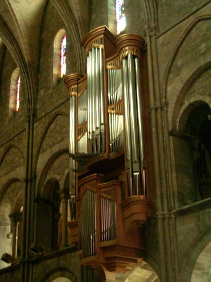 Orgues de la Basilique Saint Remi de Reims